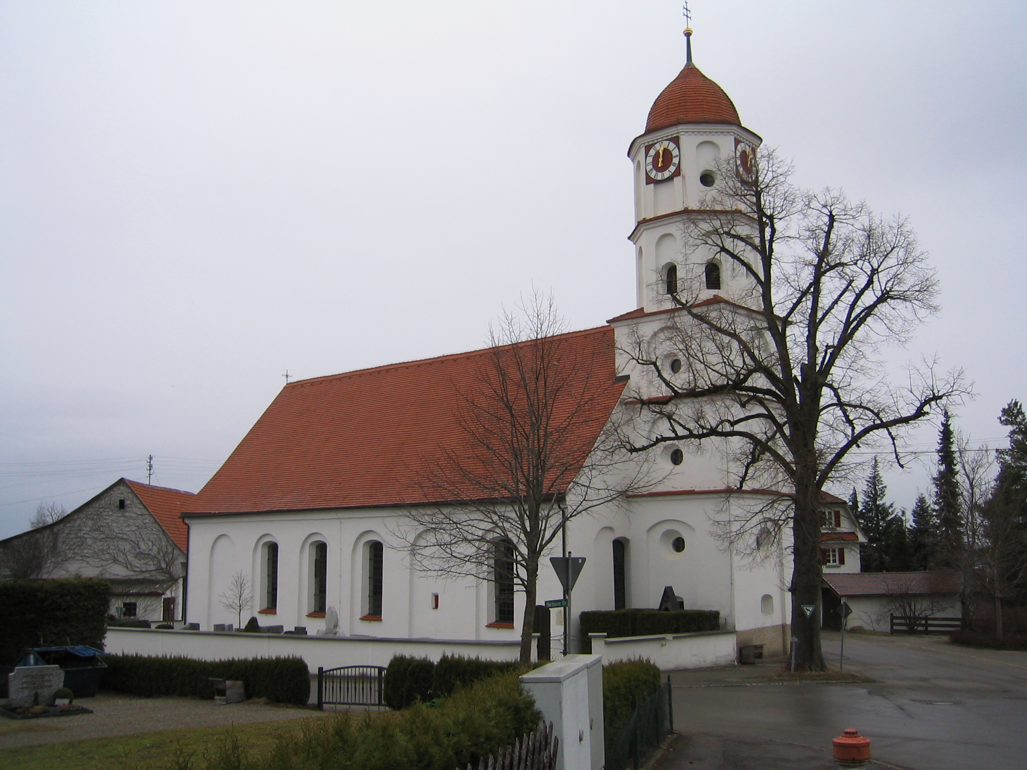 Katholische Kirche in Kronburg selbst fotografiert am 30. März 2006